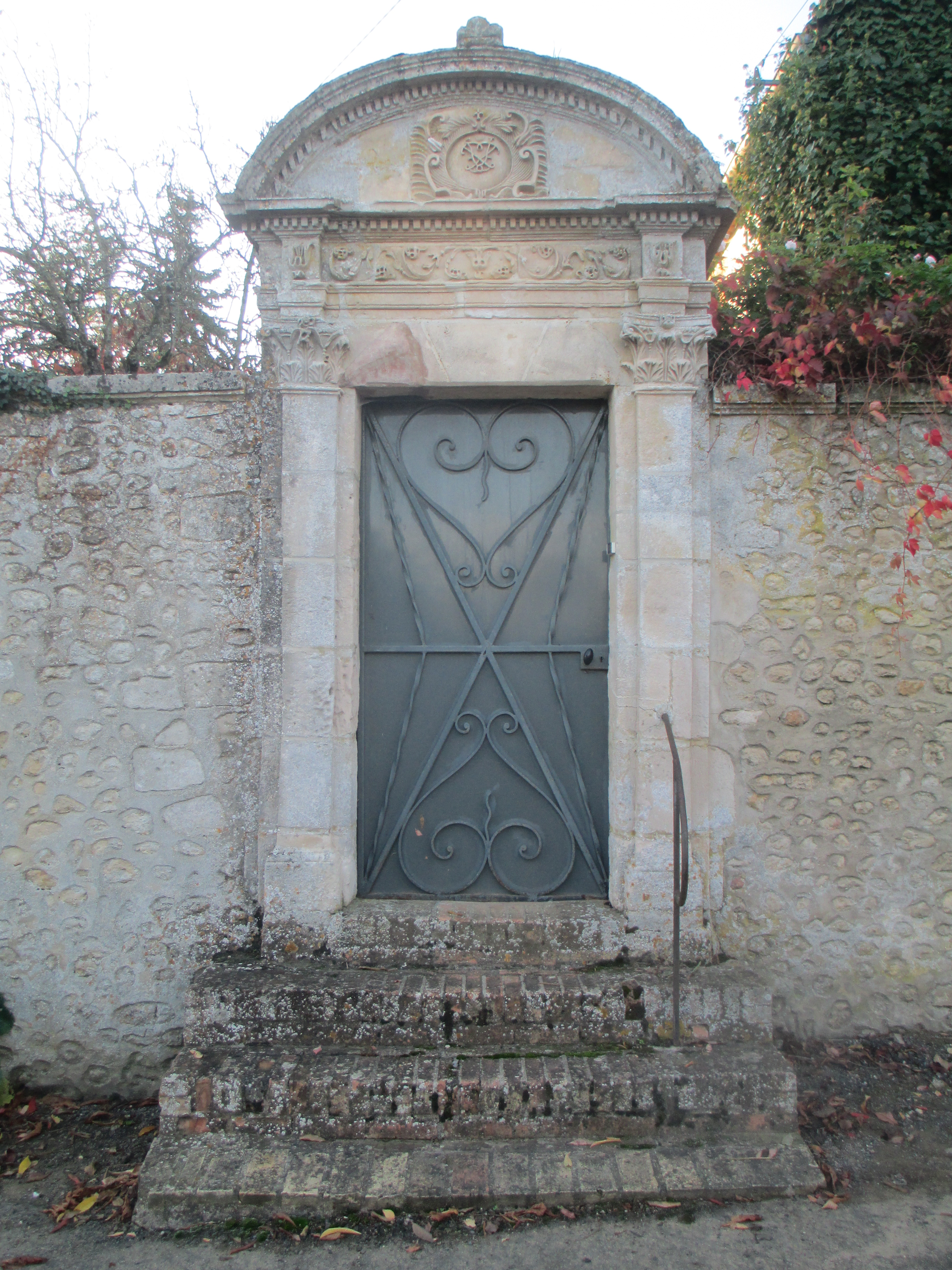 Porte du presbytère de Pizieux, dans la Sarthe.